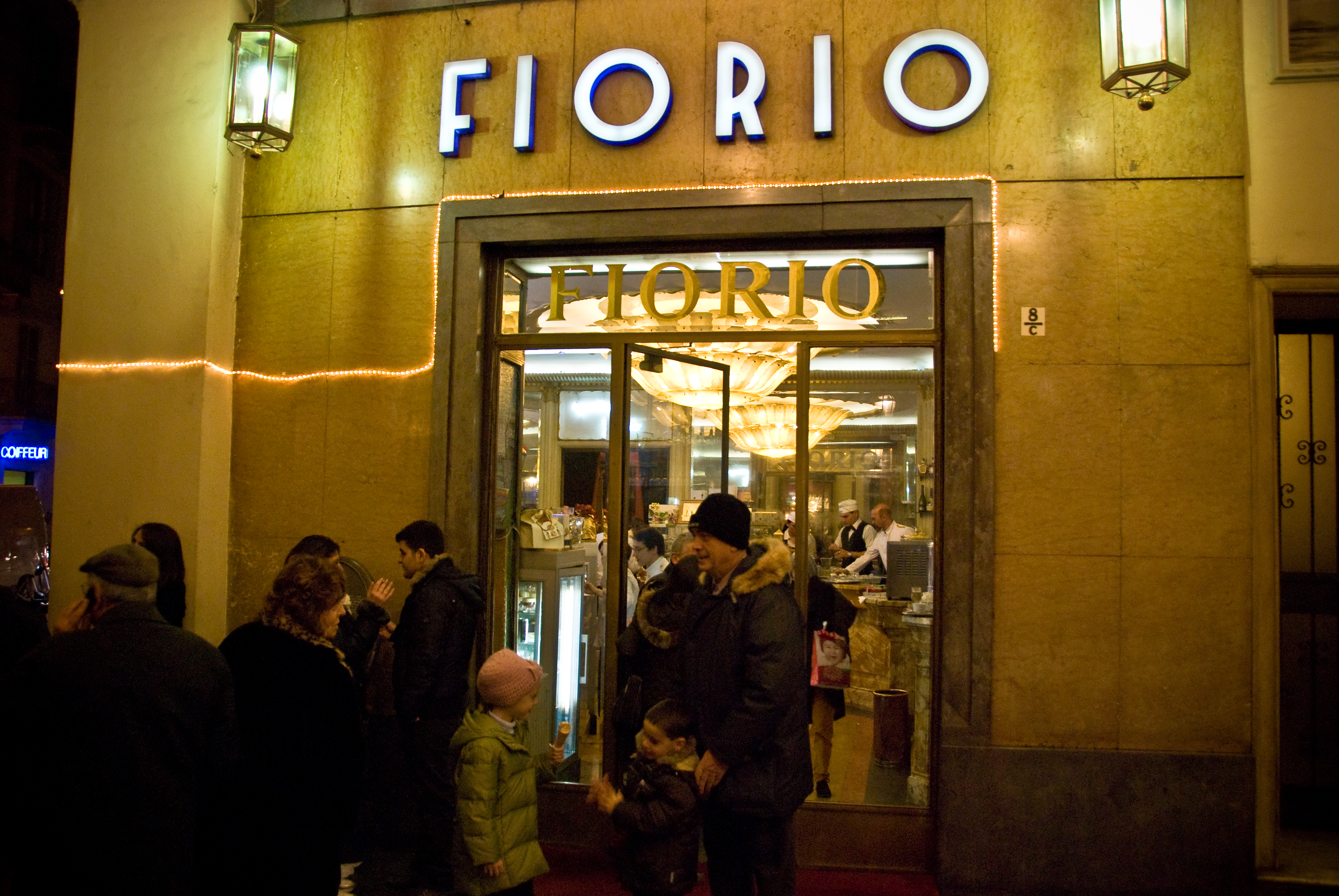 Caffè Fiorio in Torino - Italia.